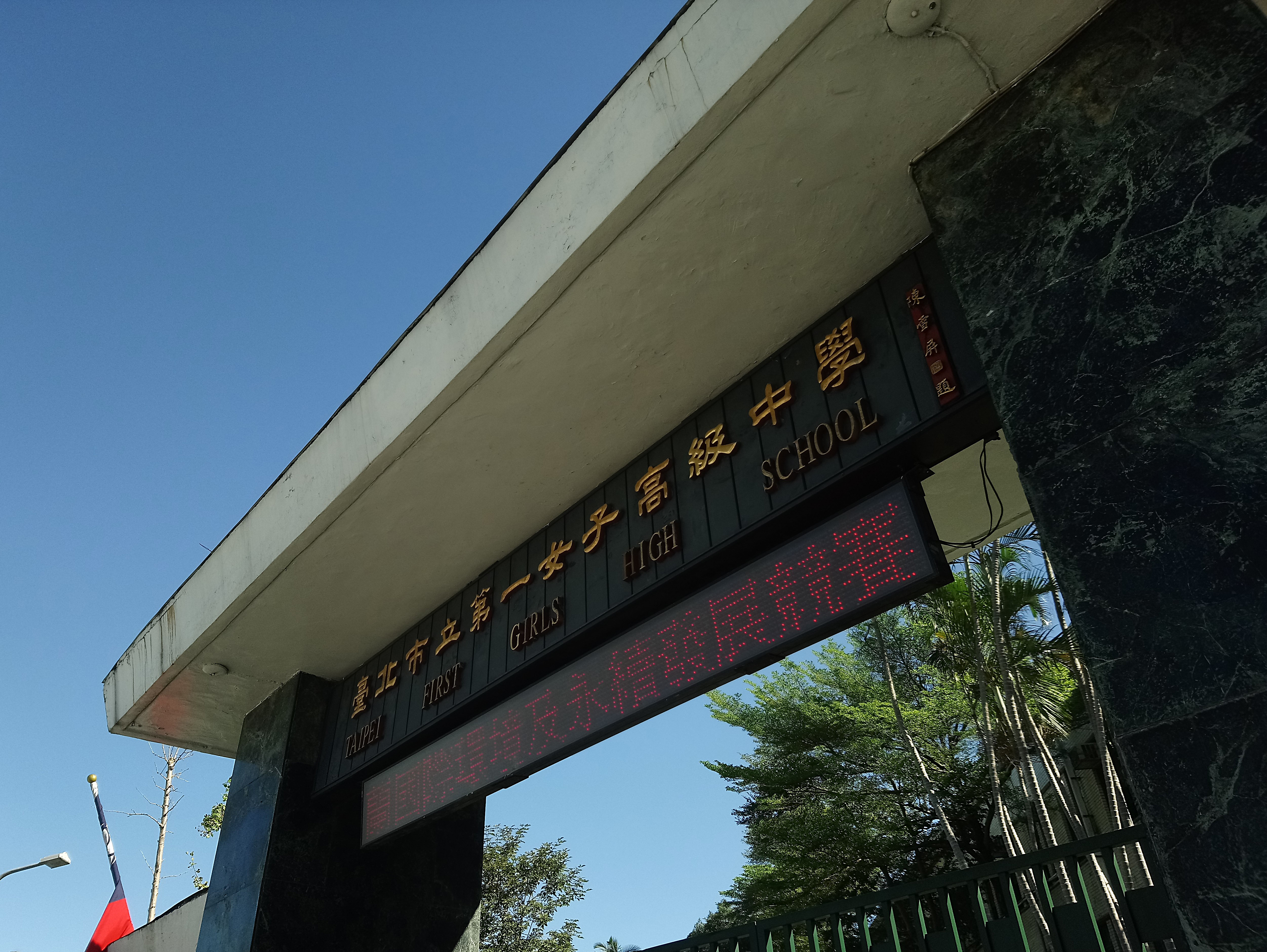 臺北市立第一女子高級中學陳雪屏所題校門,臺北市中正區城內次分區建國里